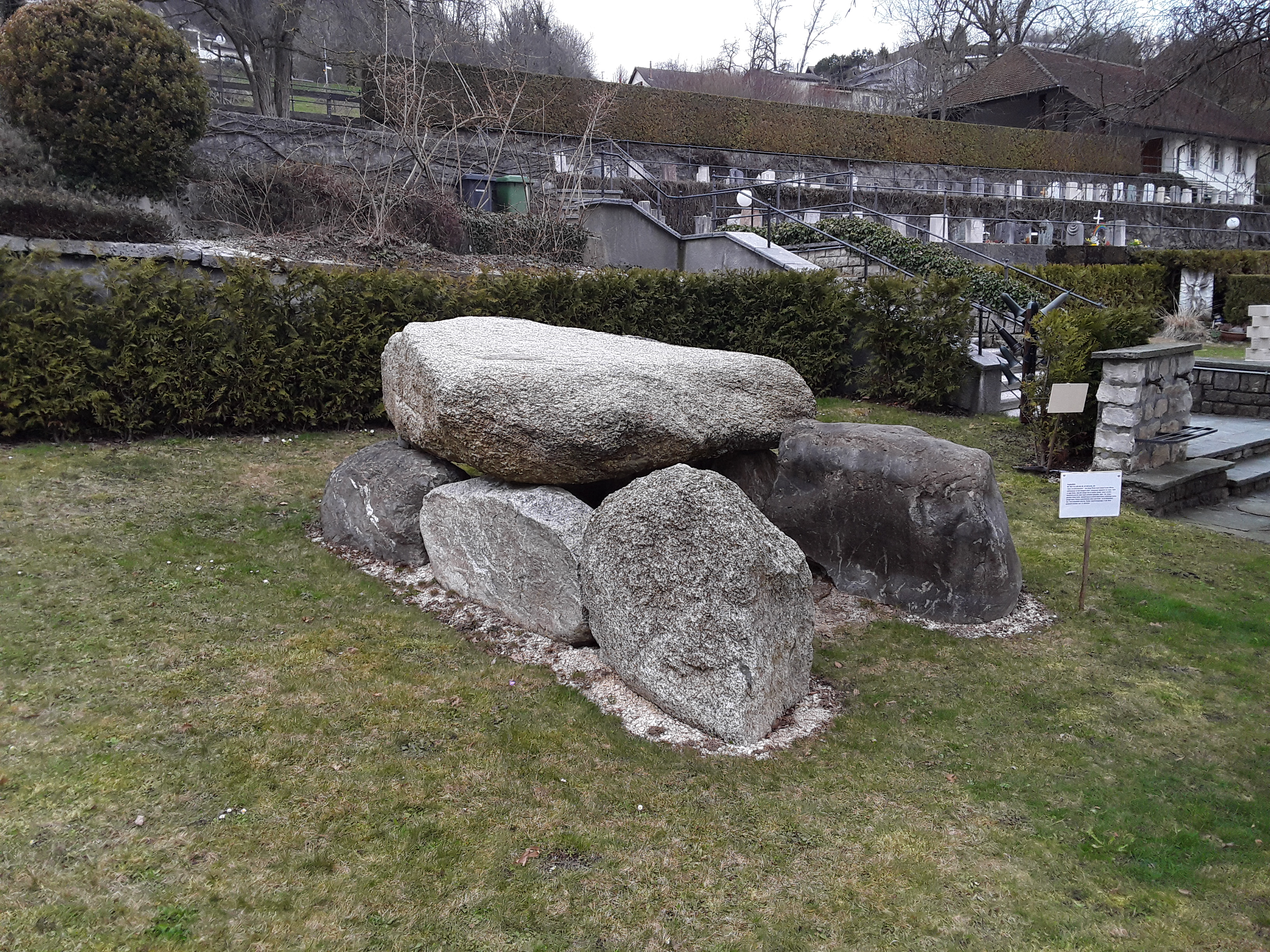 Dolmen von Oberbipp, von links